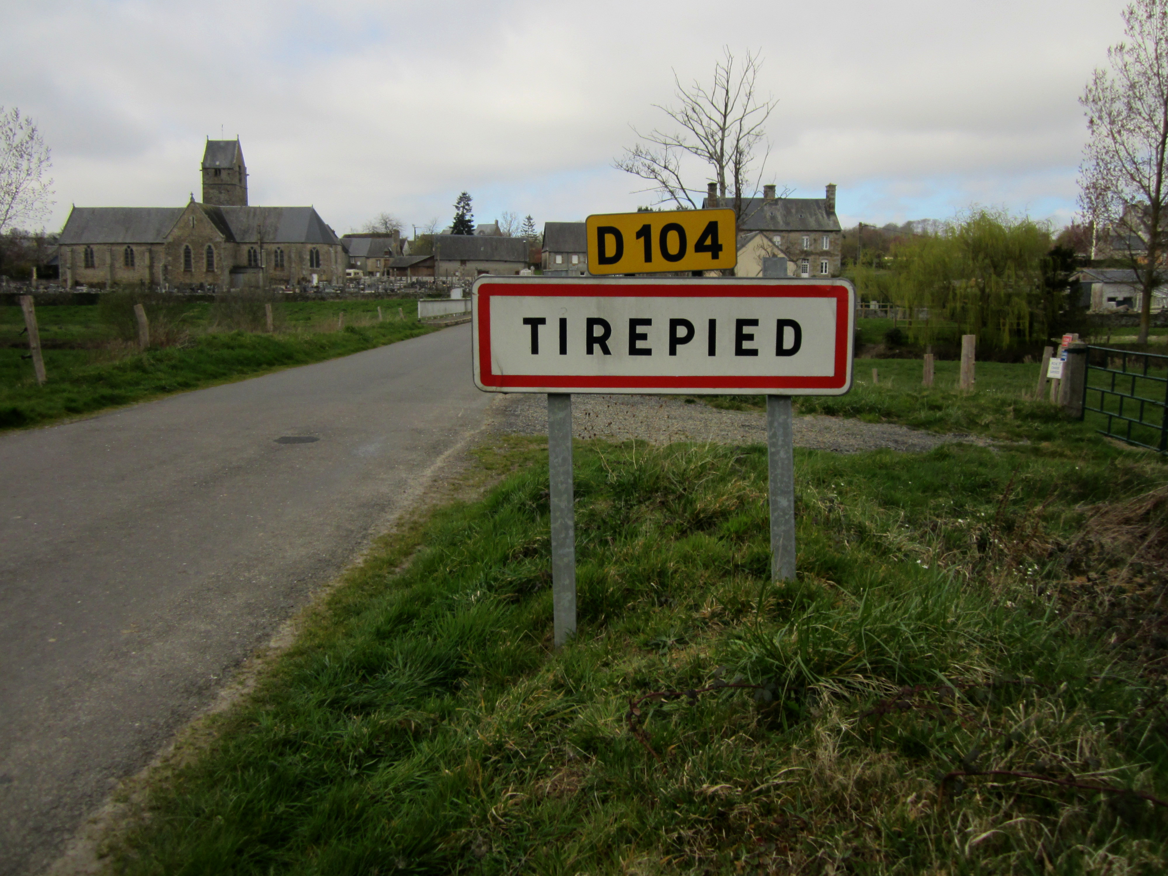 Tirepied, Manche